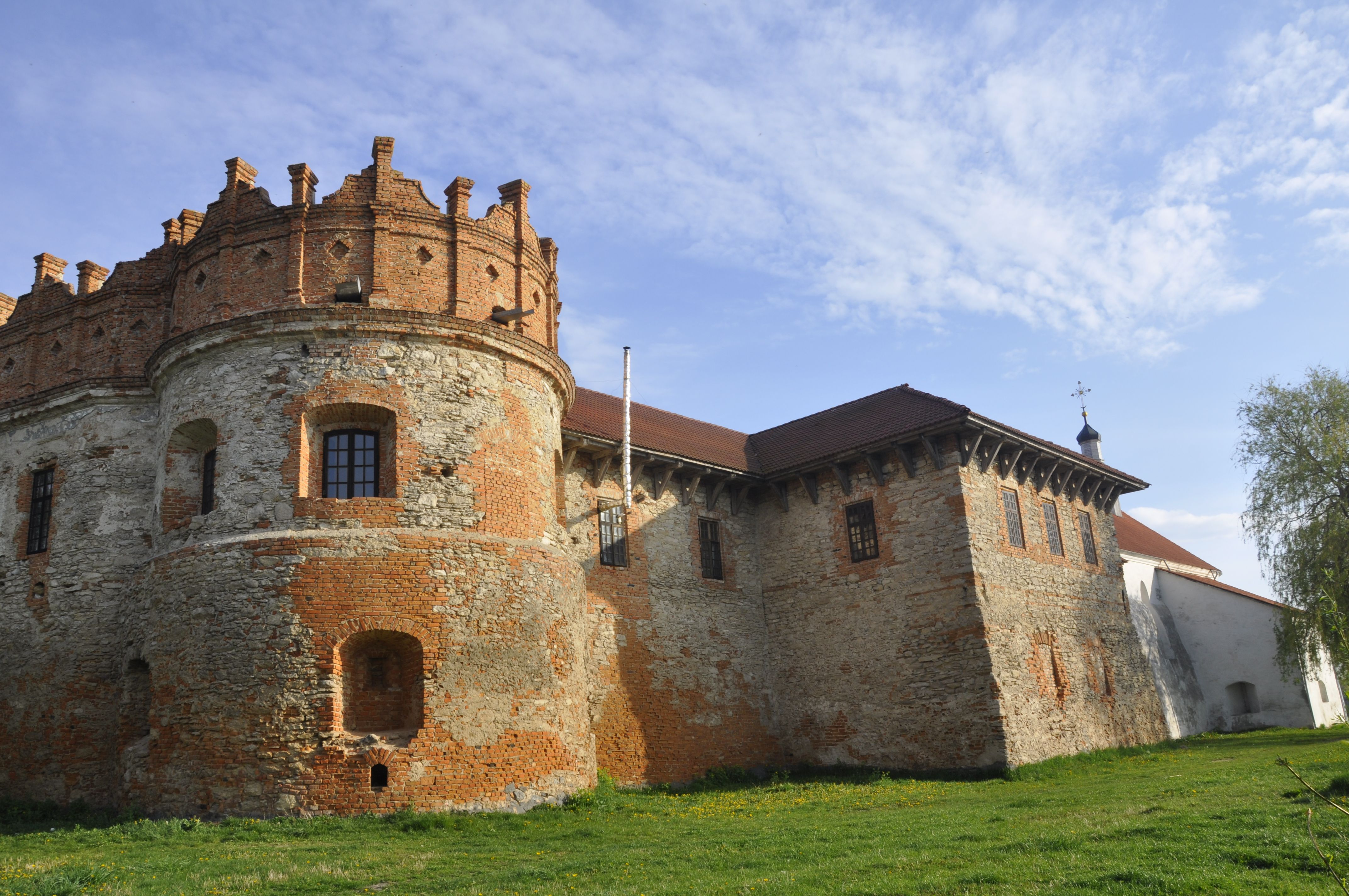 Замок, Старокостянтинів